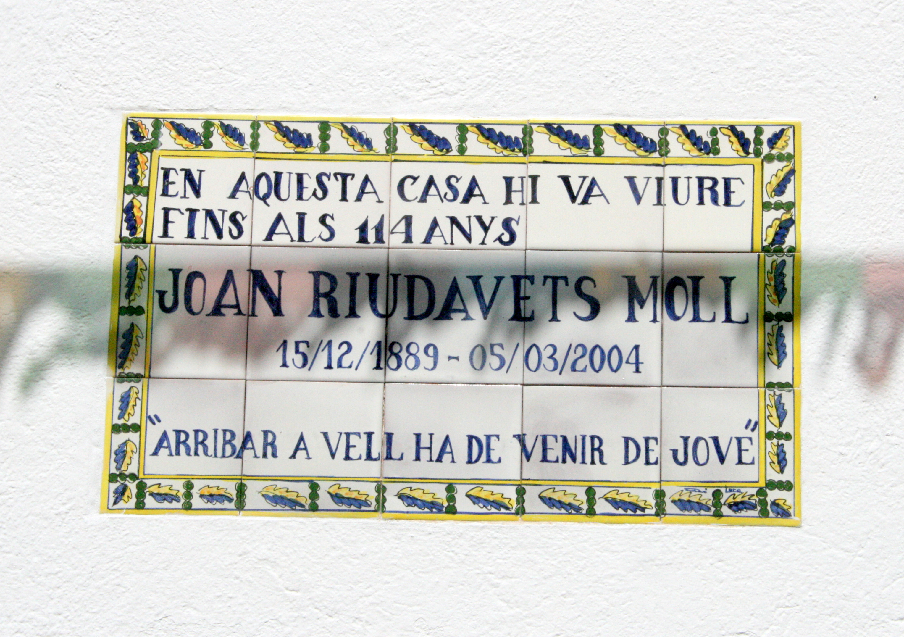 Placa en honor de Joan Riudavets en su localidad natal: "En esta casa vivió hasta los 114 años... Joan Riudavets Moll"